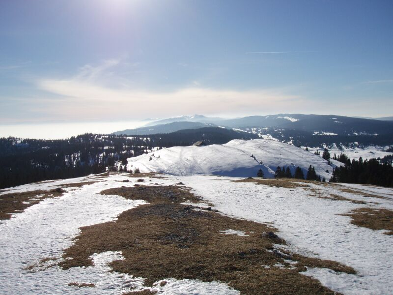 Blick vom Grand Cunay (beim Mont Tendre) nach Südwesten über die Hochflächen des Jura